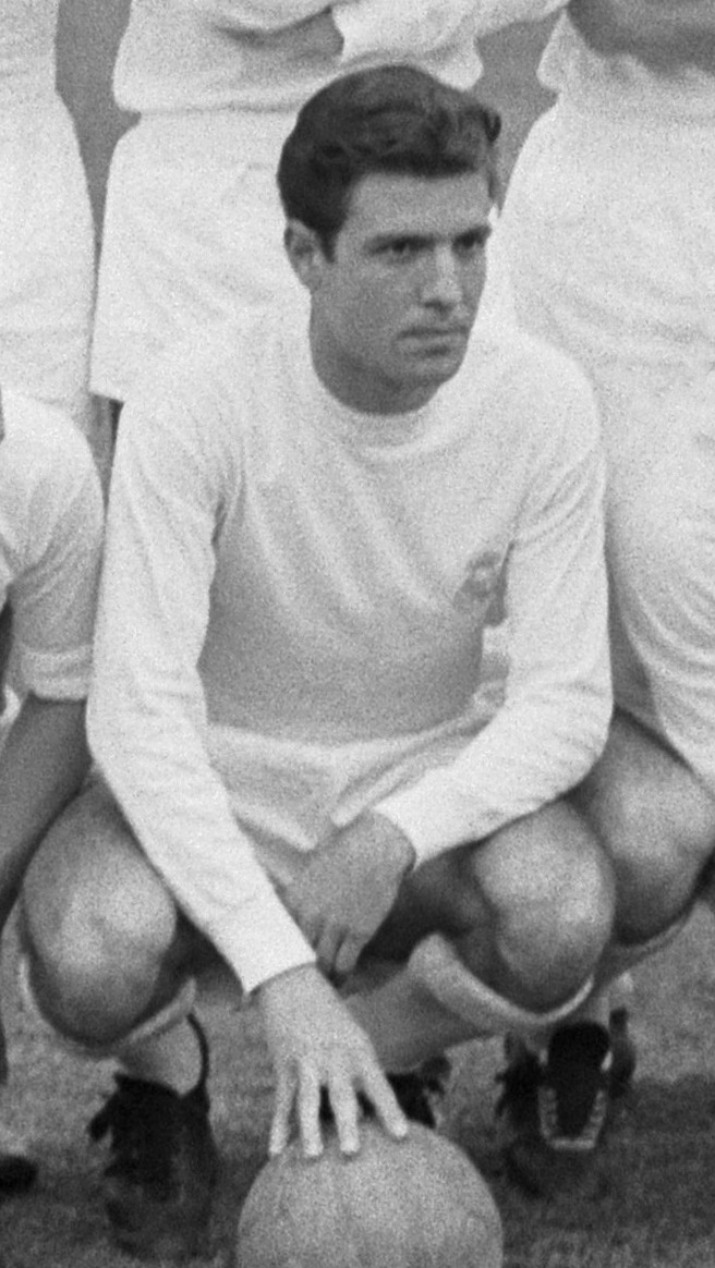 Real Madrid voor de Europacup I-finale tegen FK Partizan in het Heizelstadion, Brussel. Ramón Grosso.